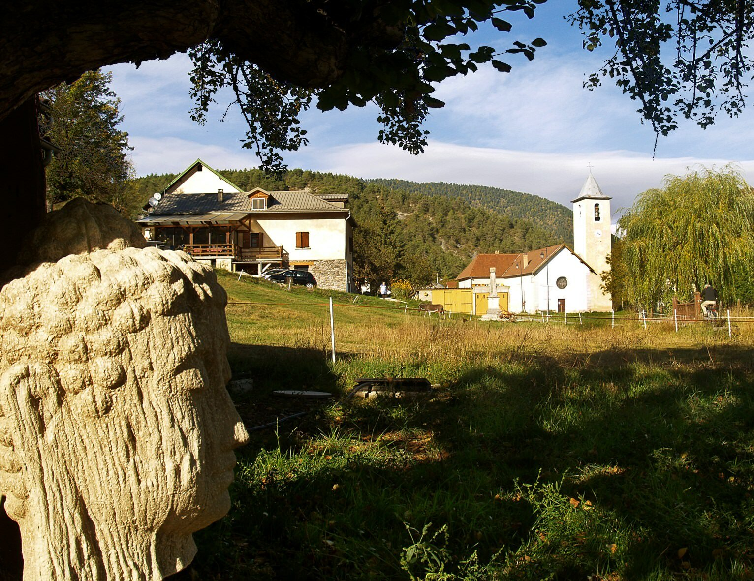 Entrée du village de Verdaches